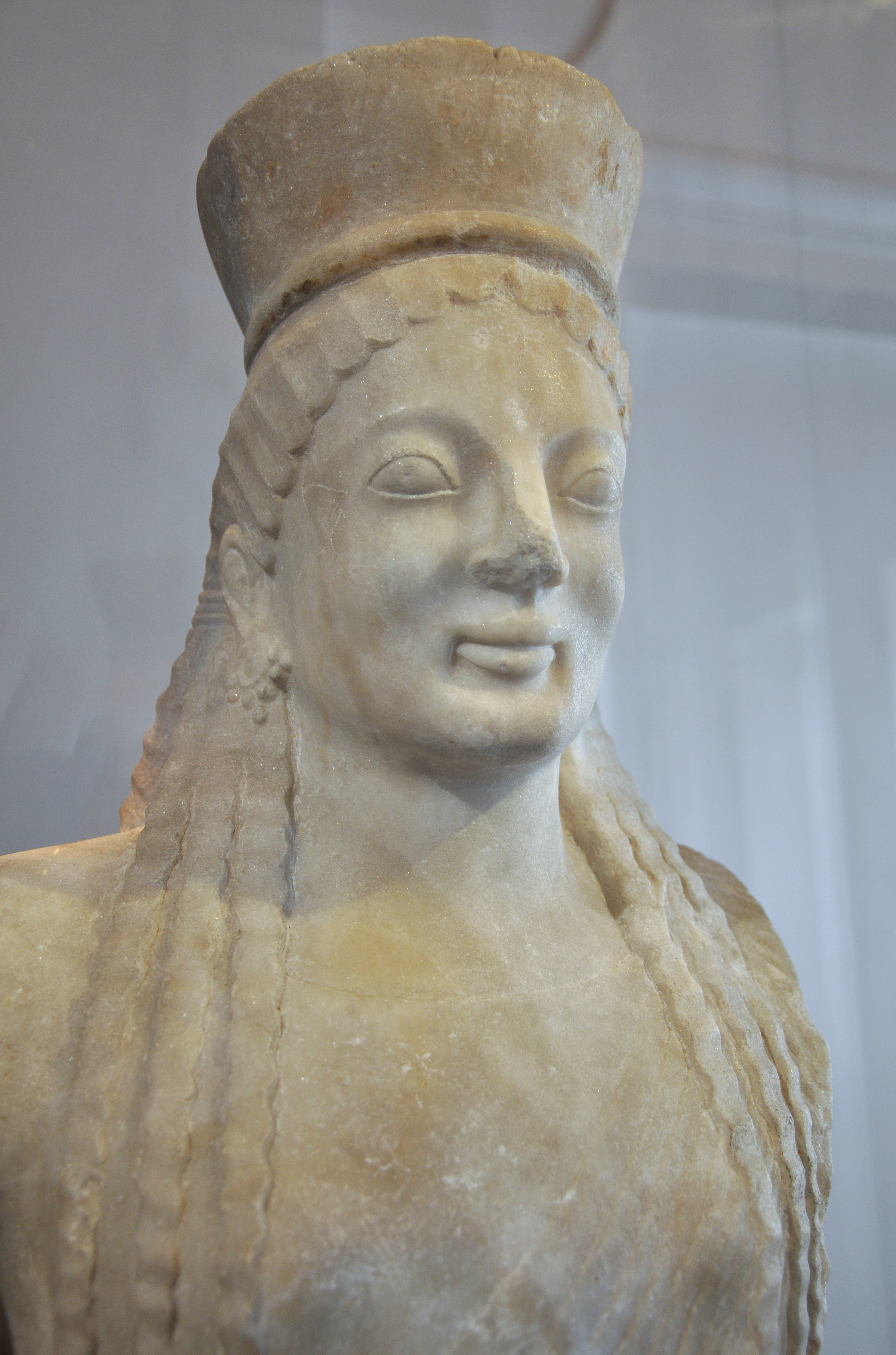 Koré ( 540-530 - JC ) provenant de l'acropole d'Athènes, en marbre. Conservée au Musée des Beaux-Arts de Lyon.